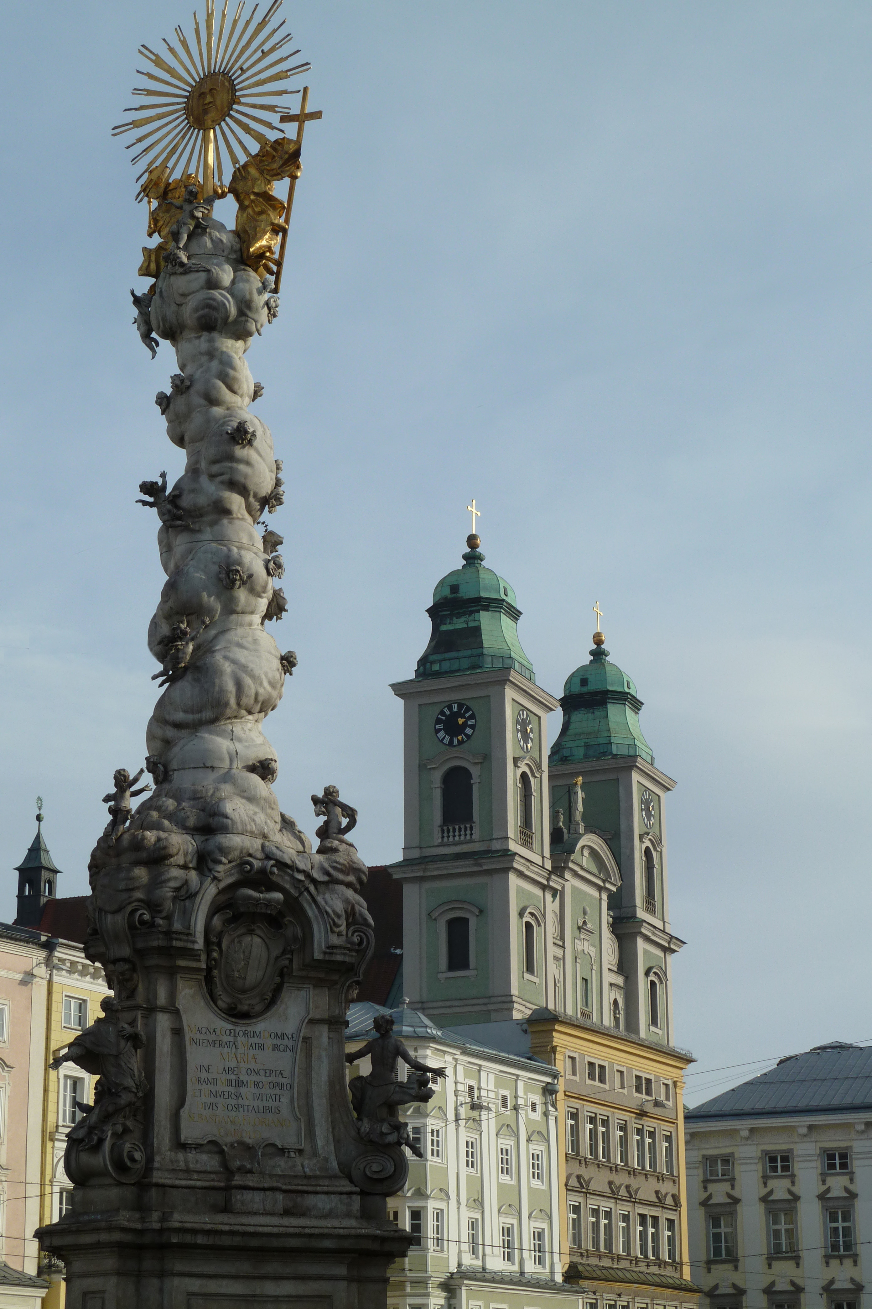 Dreifaltigkeitssäule, Dreifaltigkeitssäule mit altem Dom im Hintergrund.